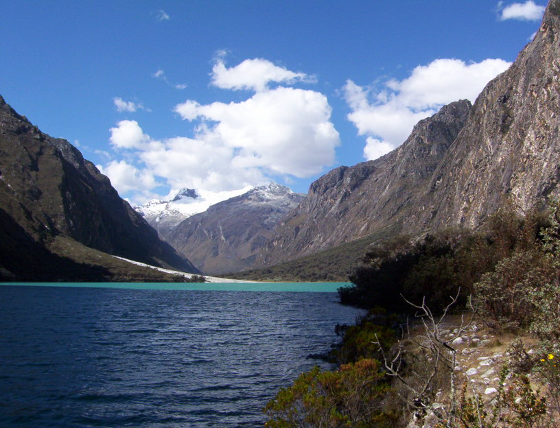 Laguna de Llanganuco en Yungay, Peru